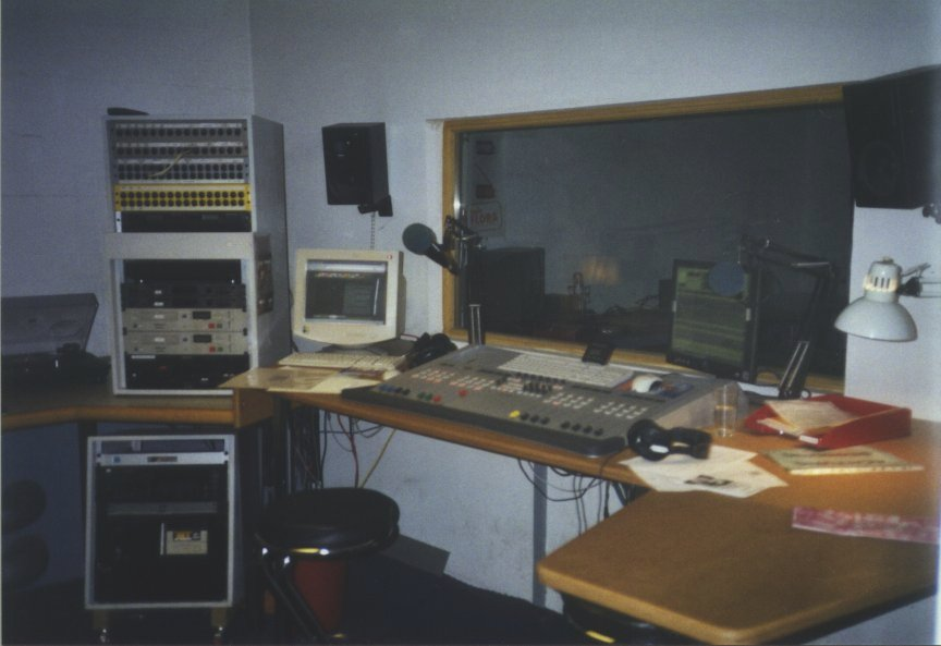 Radio flora-01